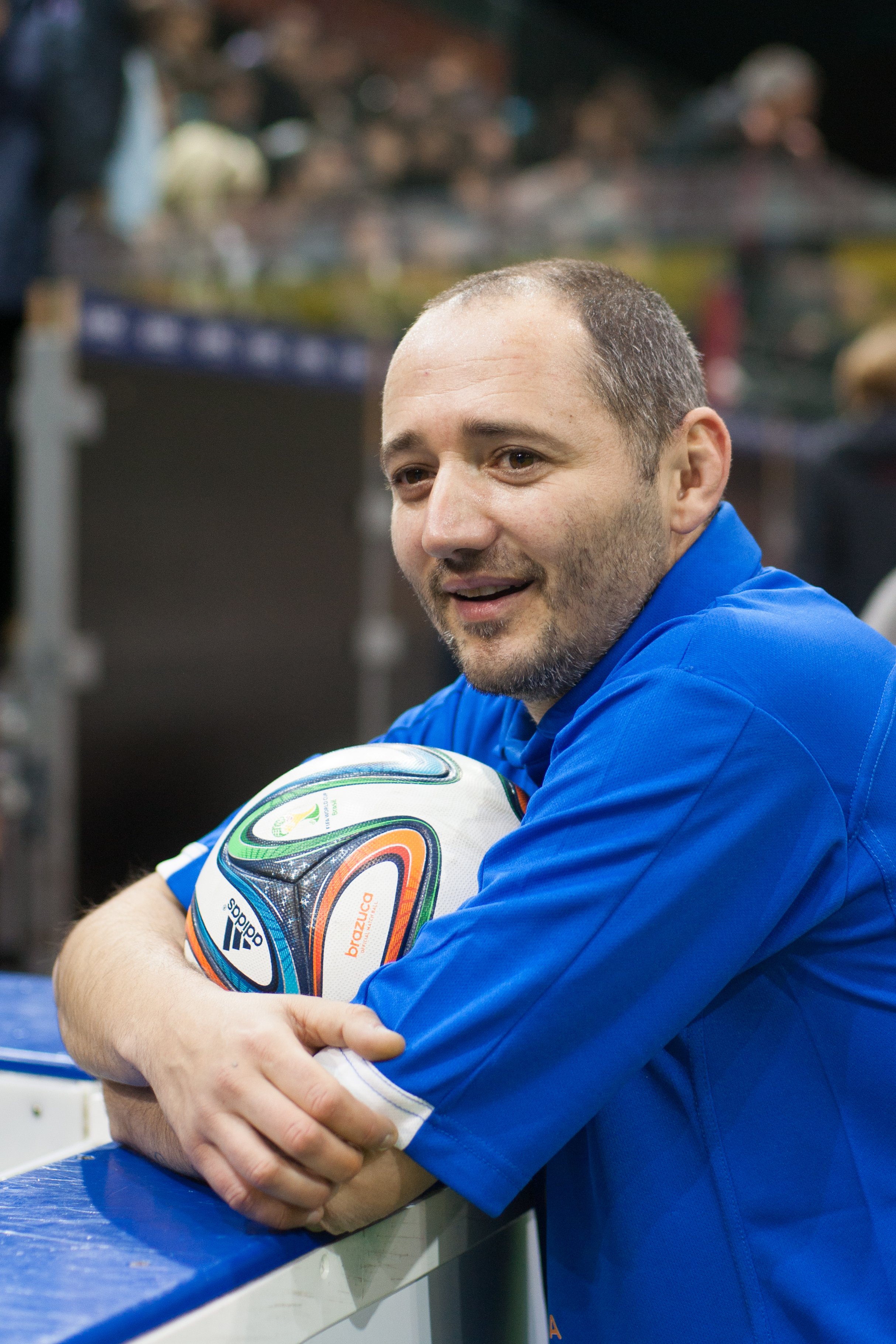 Oliver Neuville en 2014